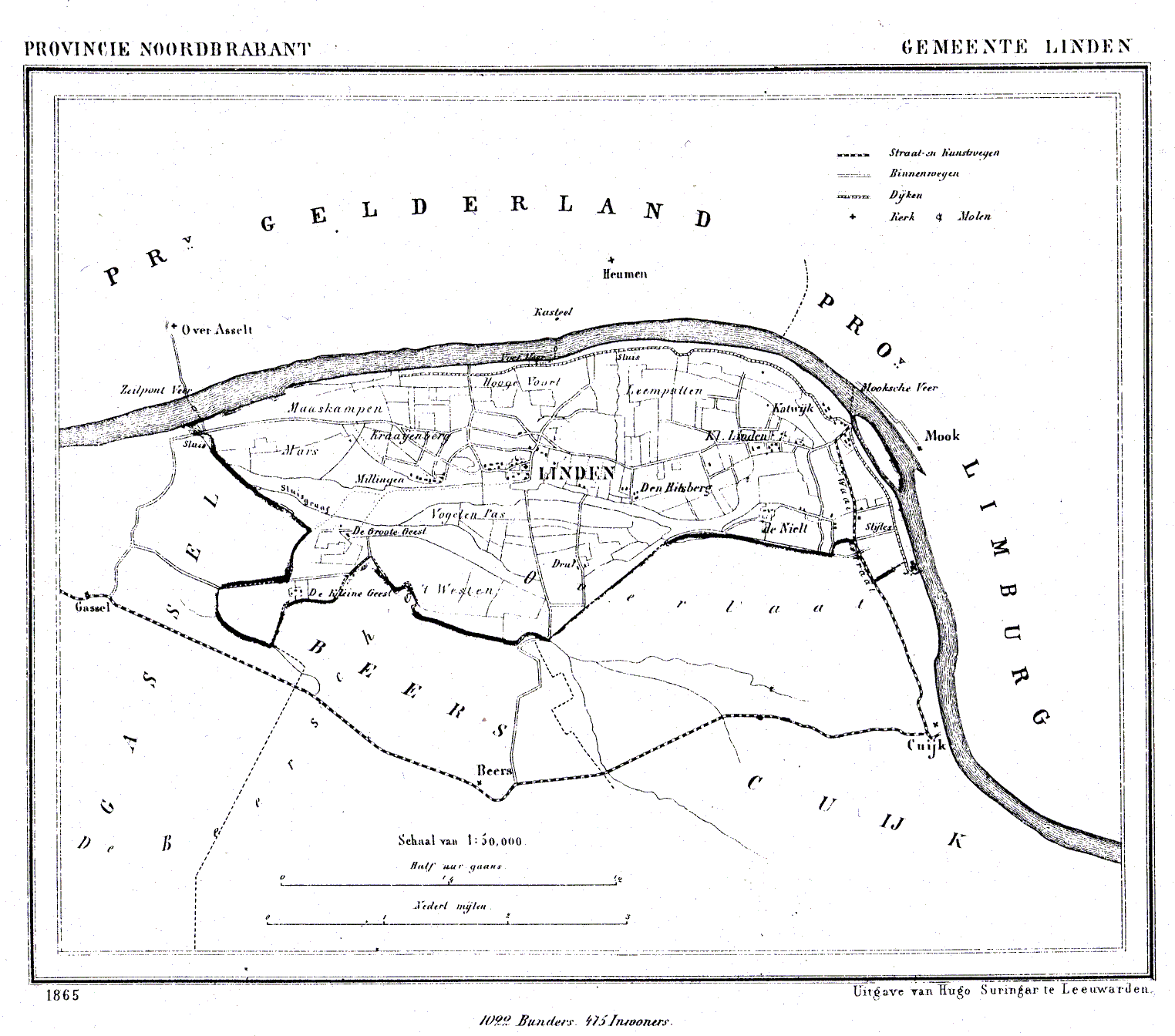 Nederland, Noord-Brabant, Gemeente Linden